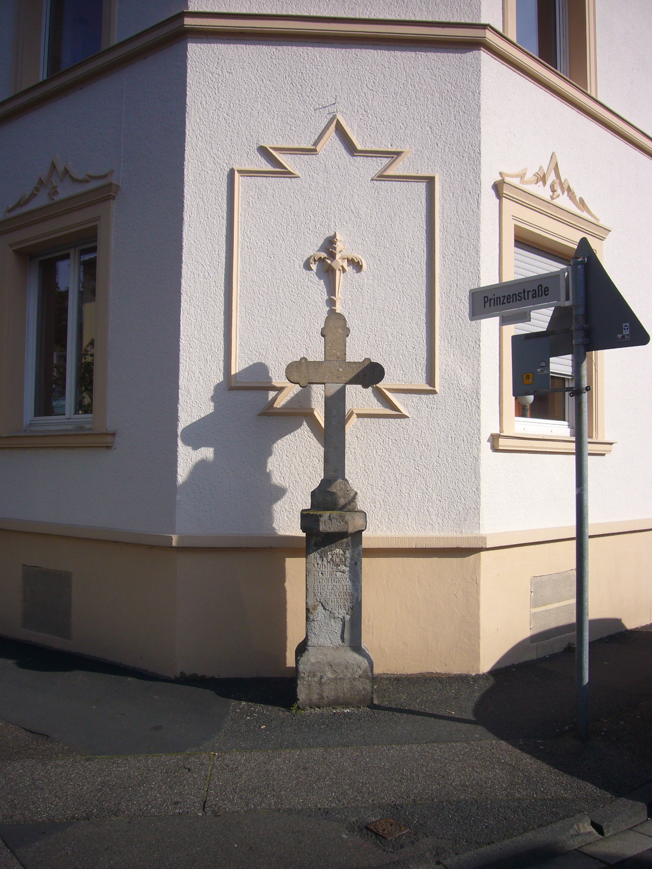 Steinwegekreuz aus dem Jahre 1731, Ecke Annaberger Straße/Prinzenstraße, Bonn-Friesdorf